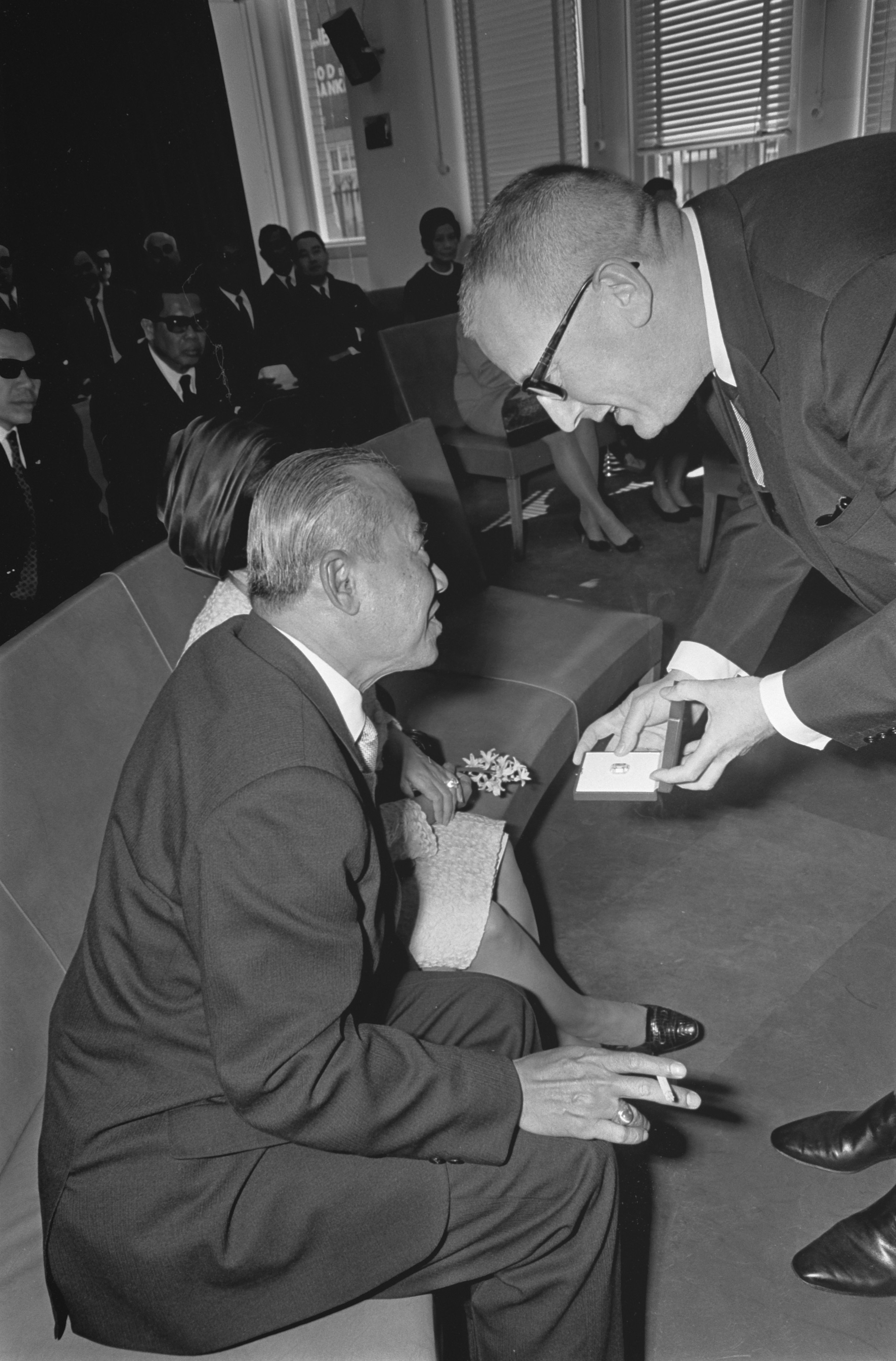 Collectie / Archief : Fotocollectie Anefo Reportage / Serie : [ onbekend ] Beschrijving : Premier Thanom Kittikachorn en echtgenote brachten bezoe aan diamantslijperij Asscher. Premier en echtgenote in diamantzagerij, rechts direkteur J. Asscher / Datum : 26 april 1968 Trefwoorden : DIAMANTSLIJPERIJEN, bezoeken, premiers Persoonsnaam : Asscher, Kittikachorn, Thanom Fotograaf : Nijs, Jac. de / Anefo Auteursrechthebbende : Nationaal Archief Materiaalsoort : Negatief (zwart/wit) Nummer archiefinventaris : bekijk toegang 2.24.01.05 Bestanddeelnummer : 921-2897